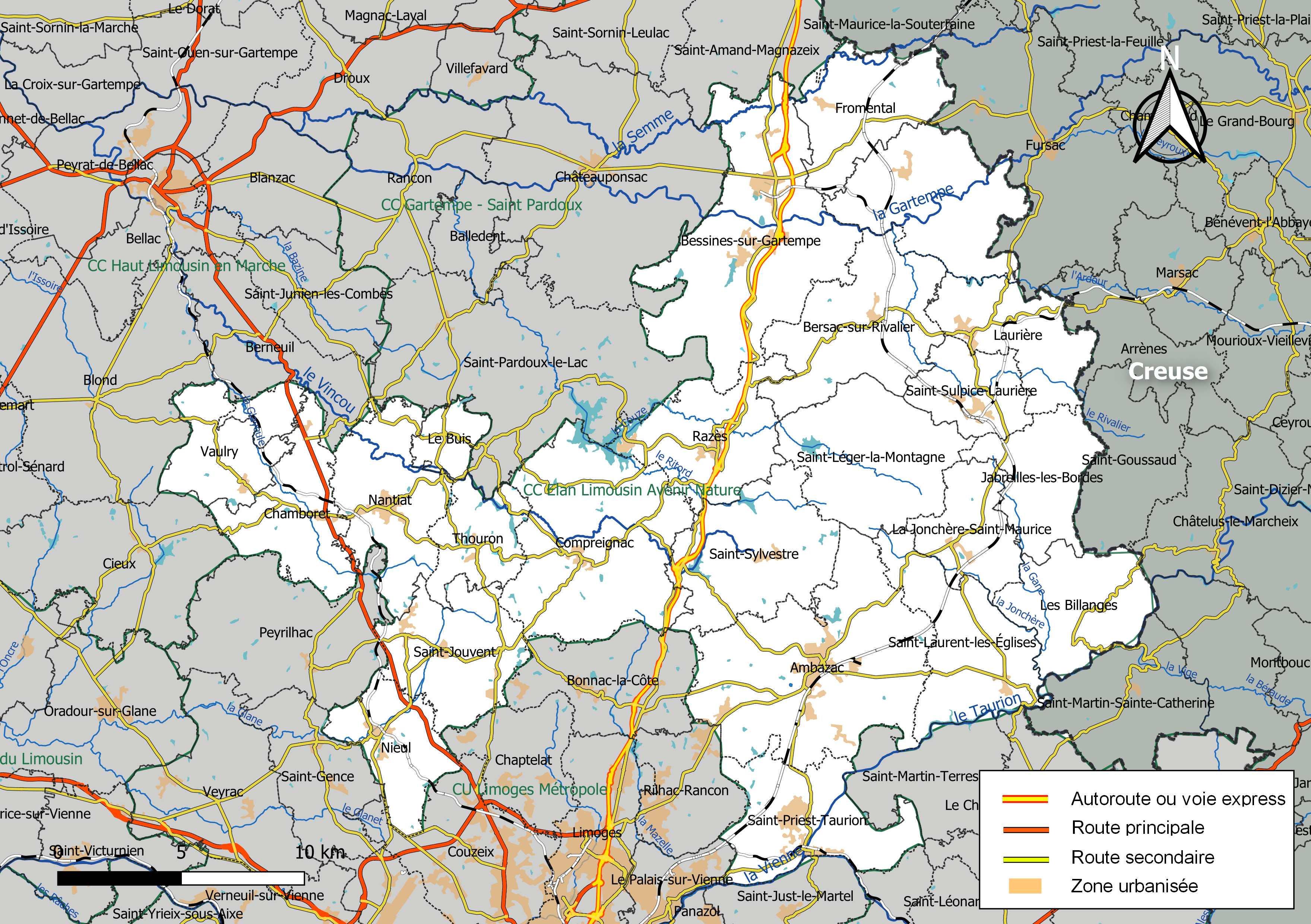 Carte géographique de la Communauté de communes Élan Limousin Avenir Nature, département de la Haute-Vienne, France. Composition au 1er janvier 2019.